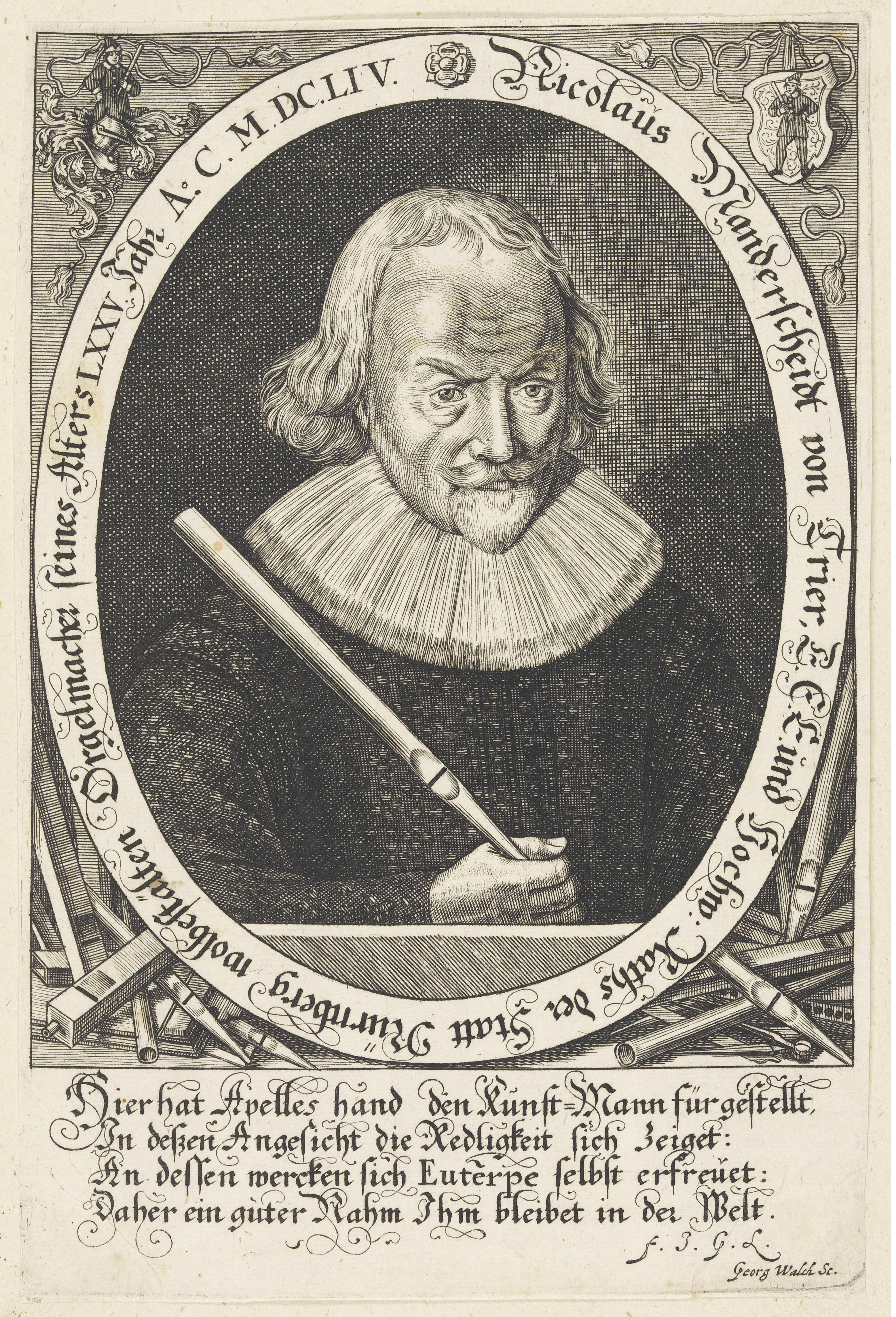 Bildnis des Nicolaus Manderscheidt; Orgelbauer Kupferstich, 18.0 x 11.8 cm (Blatt); 17.7 x 11.7 cm (Platte) Nürnberg, Germanisches Nationalmuseum, Graphische Sammlung (Paul Wolfgang Merkel'sche Familienstiftung), Inventar-Nr. MP 14976a, Kapsel-Nr. 262